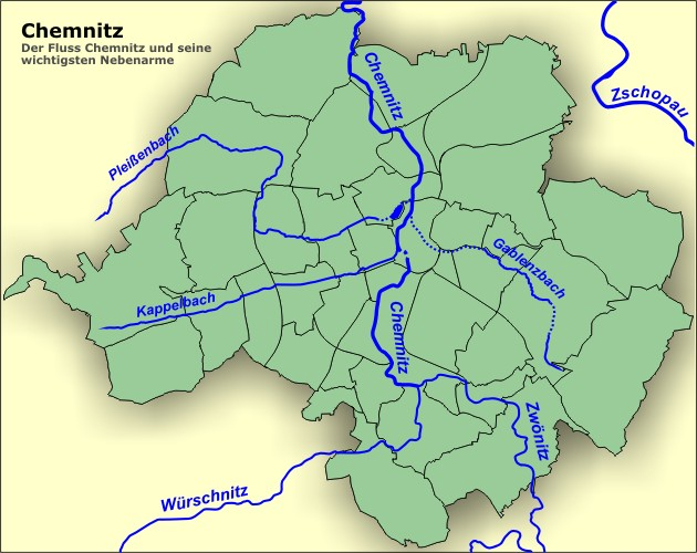 Verlauf des Flusses Chemnitz und seine wichtigsten Nebenarme innerhalb des Stadtgebietes